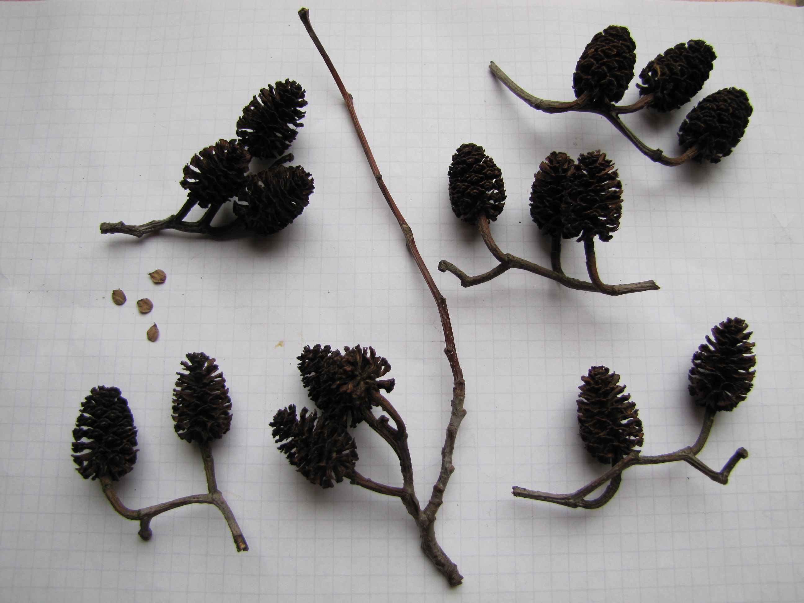 Strobiles d'aulne avec graines.